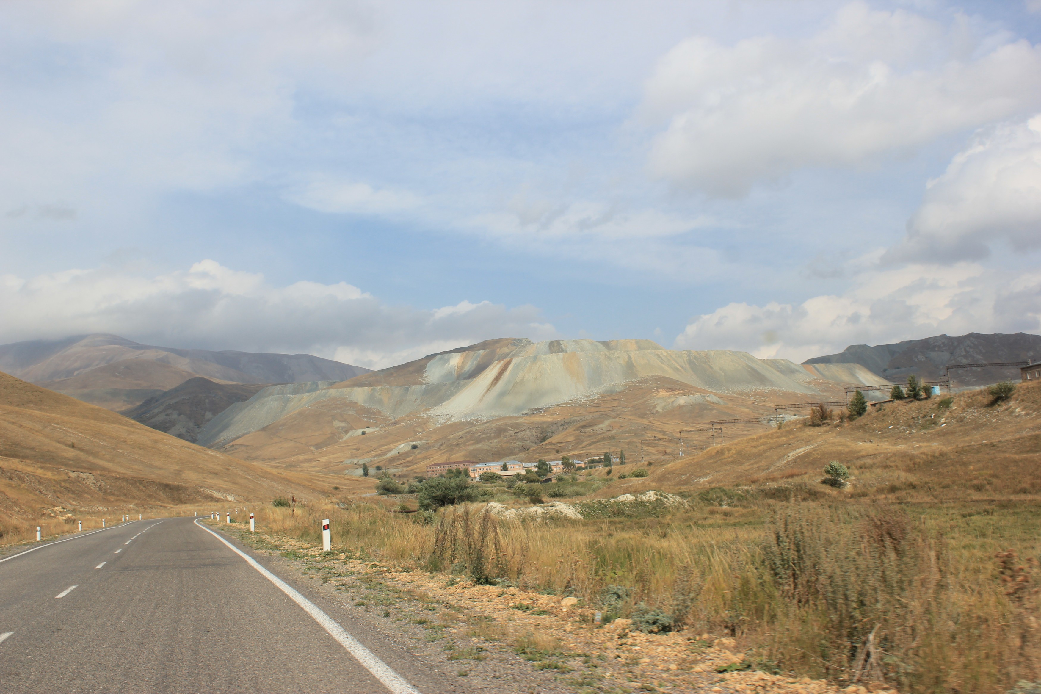 Blick von der Fernstraße Vardenis–Martanakert auf die Abraumhalde der Goldmine von Sotk.